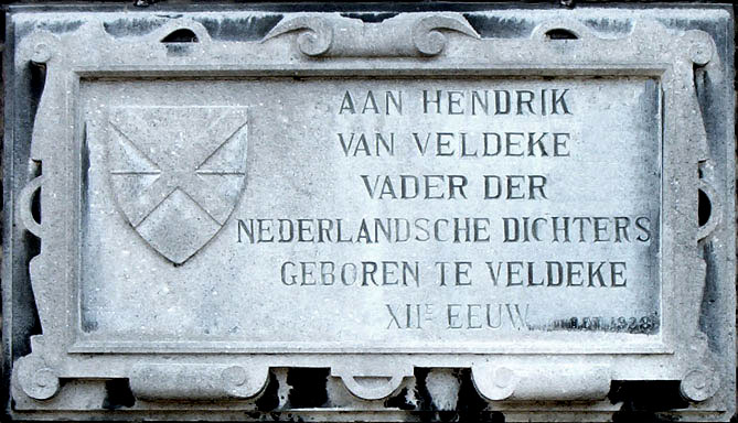 Gedenkplaat bij de Veldekemolen in Spalbeek (Hasselt in Vlaanderen) Eigen foto willy leenders pandora be